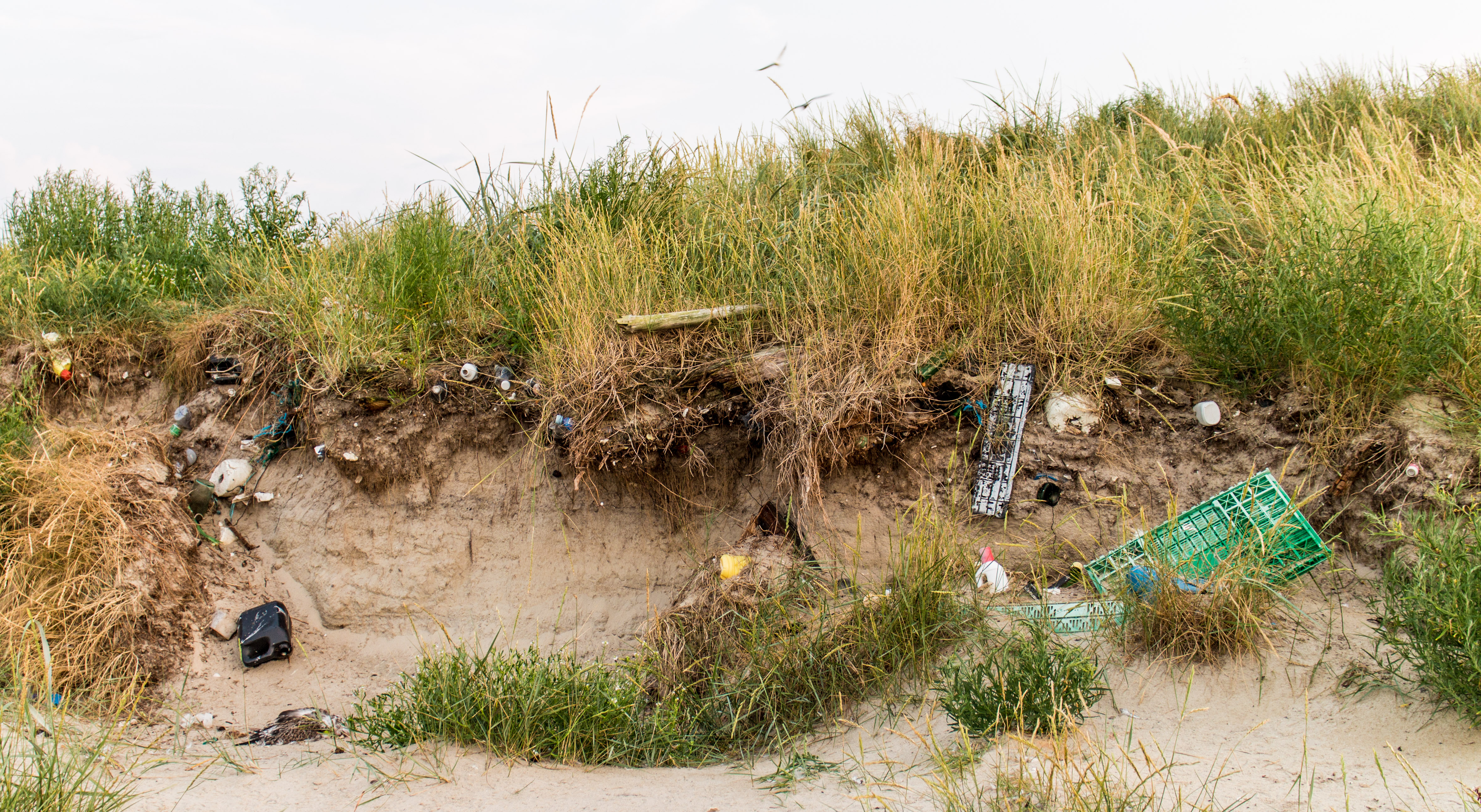 Müll als Bestandteil der nördlichen Dünenabbruchkante auf Scharhörn (außerhalb der OSPAR Müllmonitoringstrecke, wurde also nicht noch speziell gehäuft oder gesammelt)